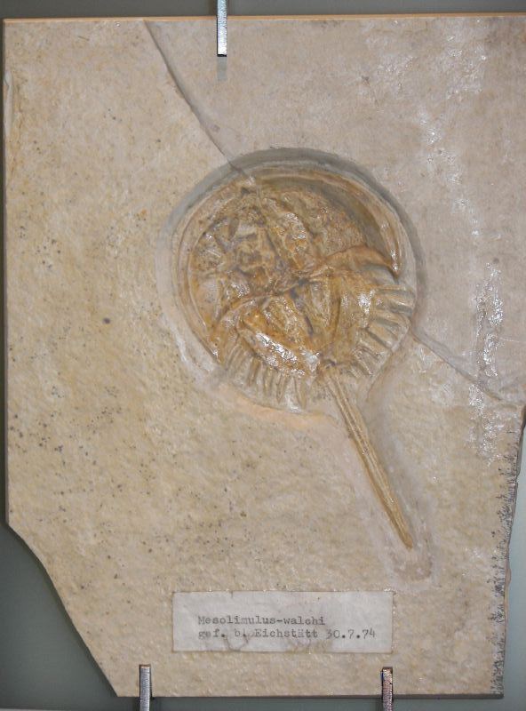 Berlin, Naturkundemuseum. Mesolimulus walchi